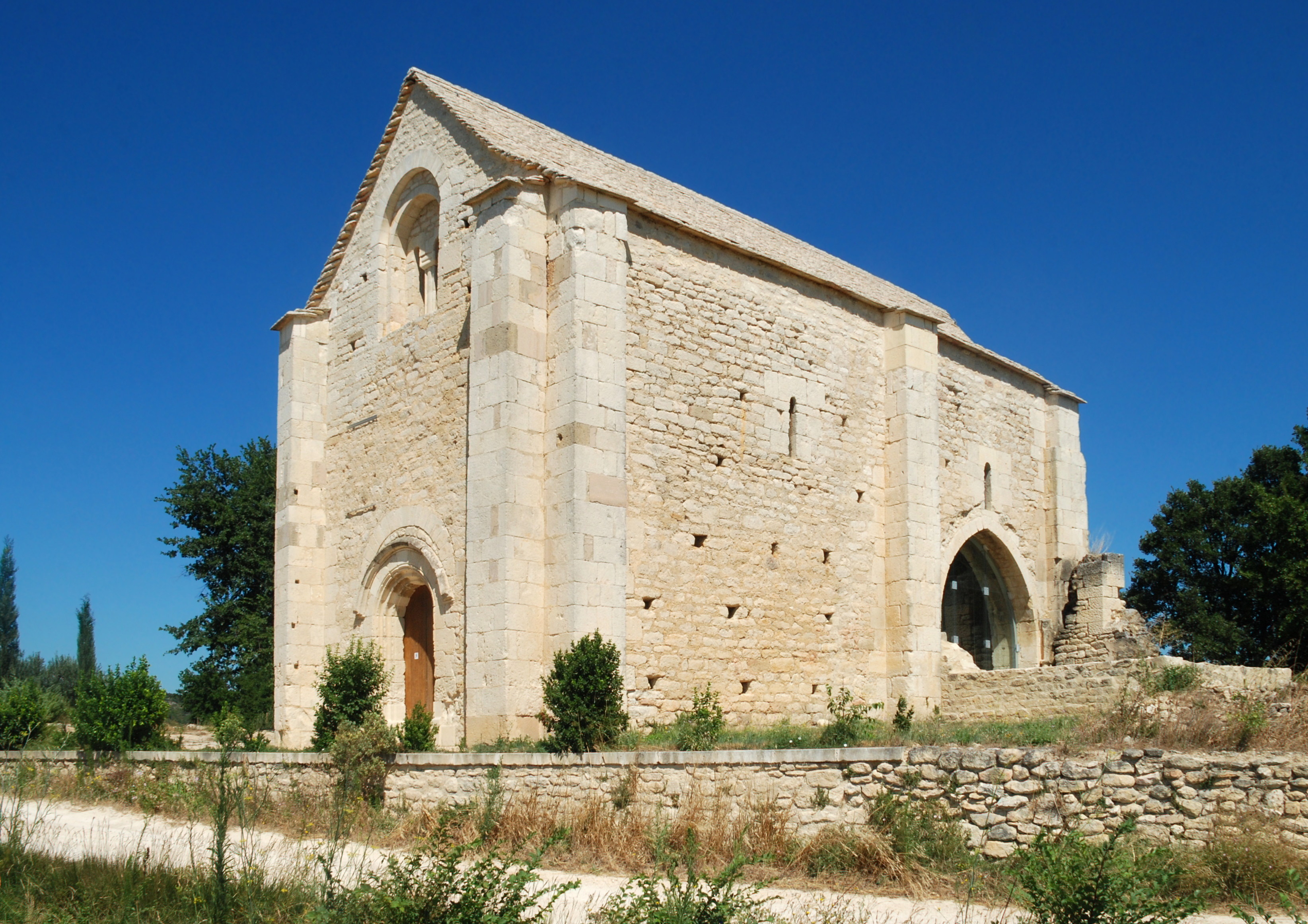 France - Gard - Chapelle Saint-Étienne de Saint-Hilaire-d'Ozilhan .